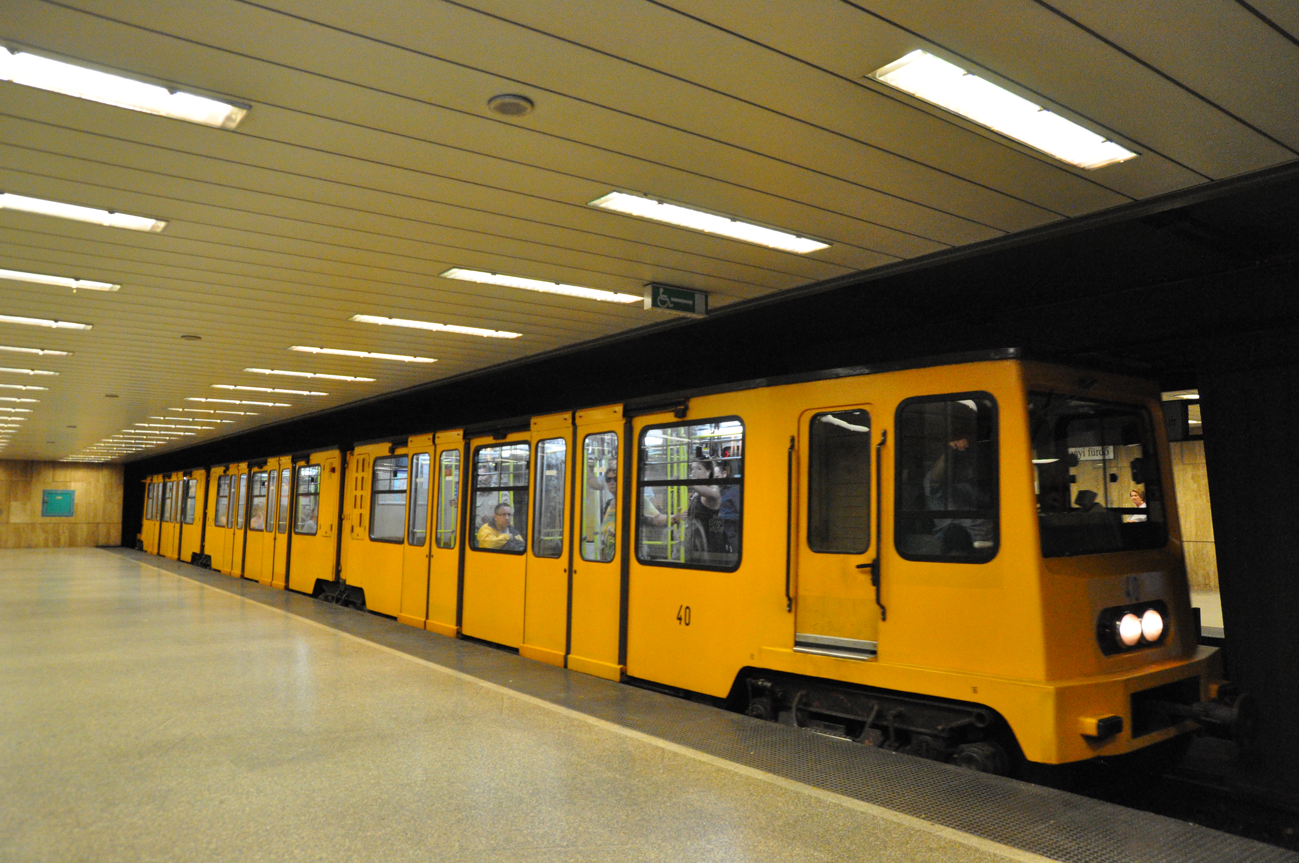 Budapest, metró 1, Széchenyi fürdő